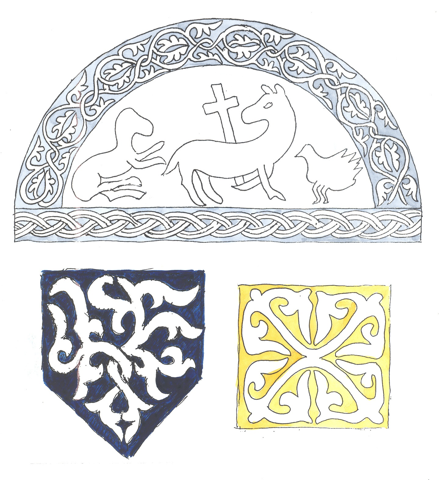 A Böde-Zalaszentmihályfán található magányos templom nyugati kapujának díszítése, Bérczi Szaniszló rajza